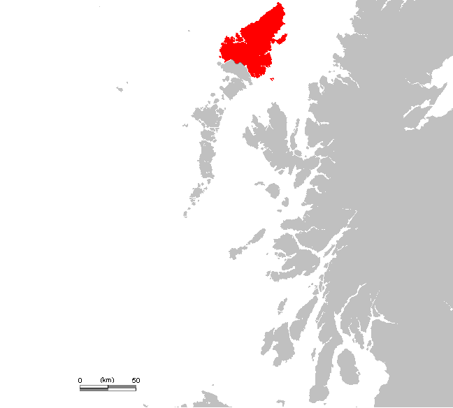 Carte de l'île de lewis en Ecosse